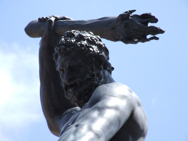 Augsburg Herkulusbrunnen in der Maximilianstraße